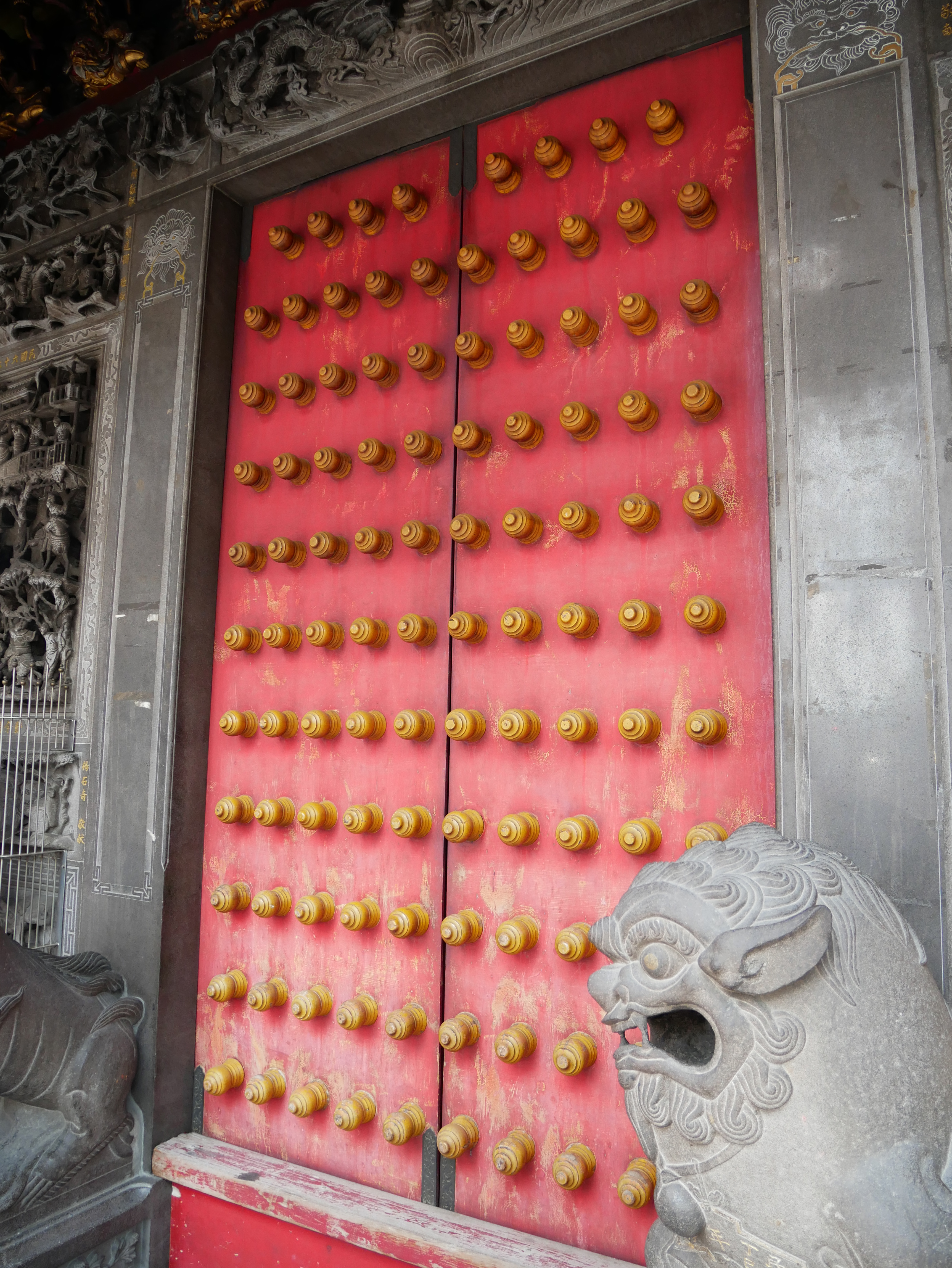 中文（台灣）: 新莊武聖廟廟門，新北市新莊區文衡里